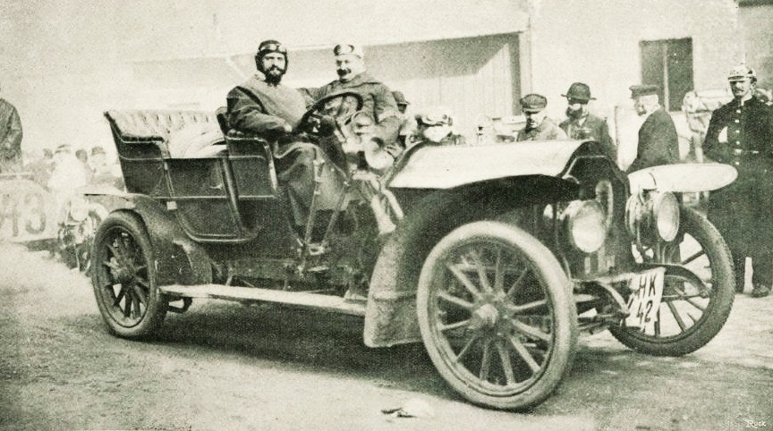 Le français Marc Sorel, classé à l'Herkomer Konkurrenz 1906 sur Lorraine-Dietrich, La Vie au Grand Air, 30 juin 1906